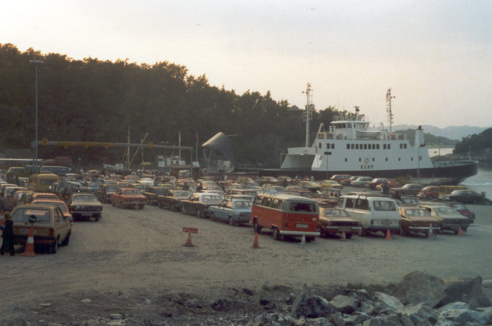 MF Kvam, built 1977.